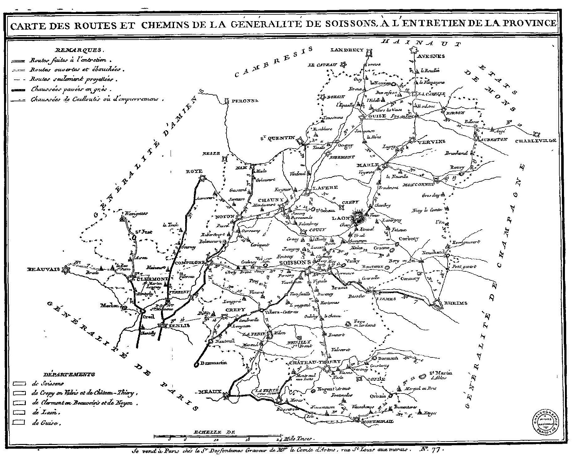 Dernière carte de la généralité datant entre 1780 et 1783, reprise par l'ouvrage la formation du département de l'Aisne en 1790 par René Hennequin pour illustrer.